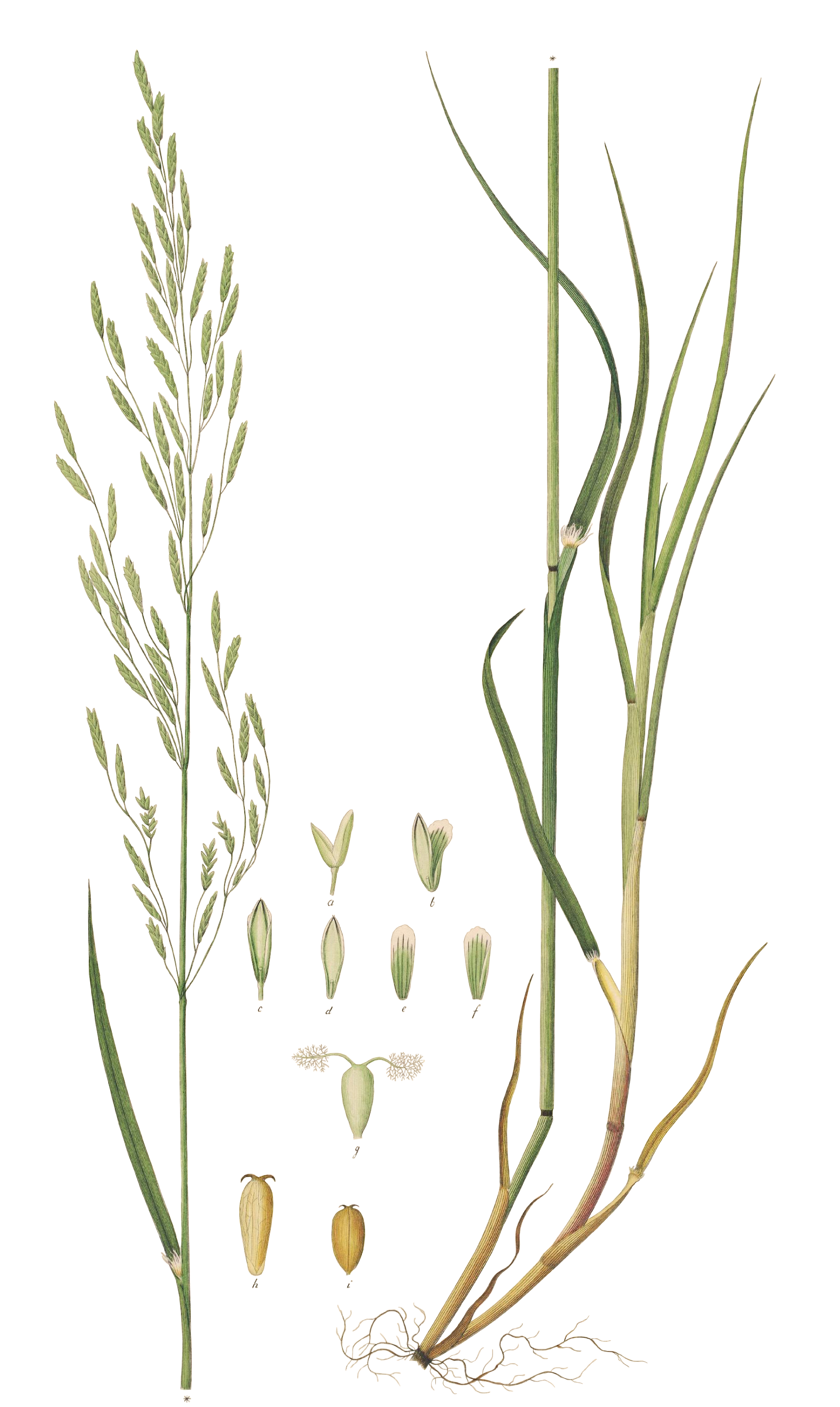 Glyceria plicata Fr. = Glyceria notata Chevall.